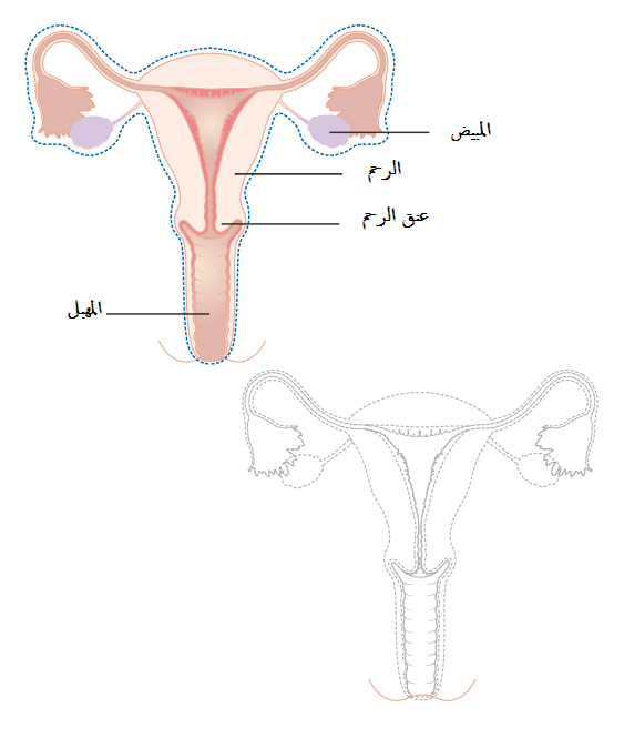 استئصال جذري للرحم لعلاج سرطان المهبل بدون إعادة بناء المهبل